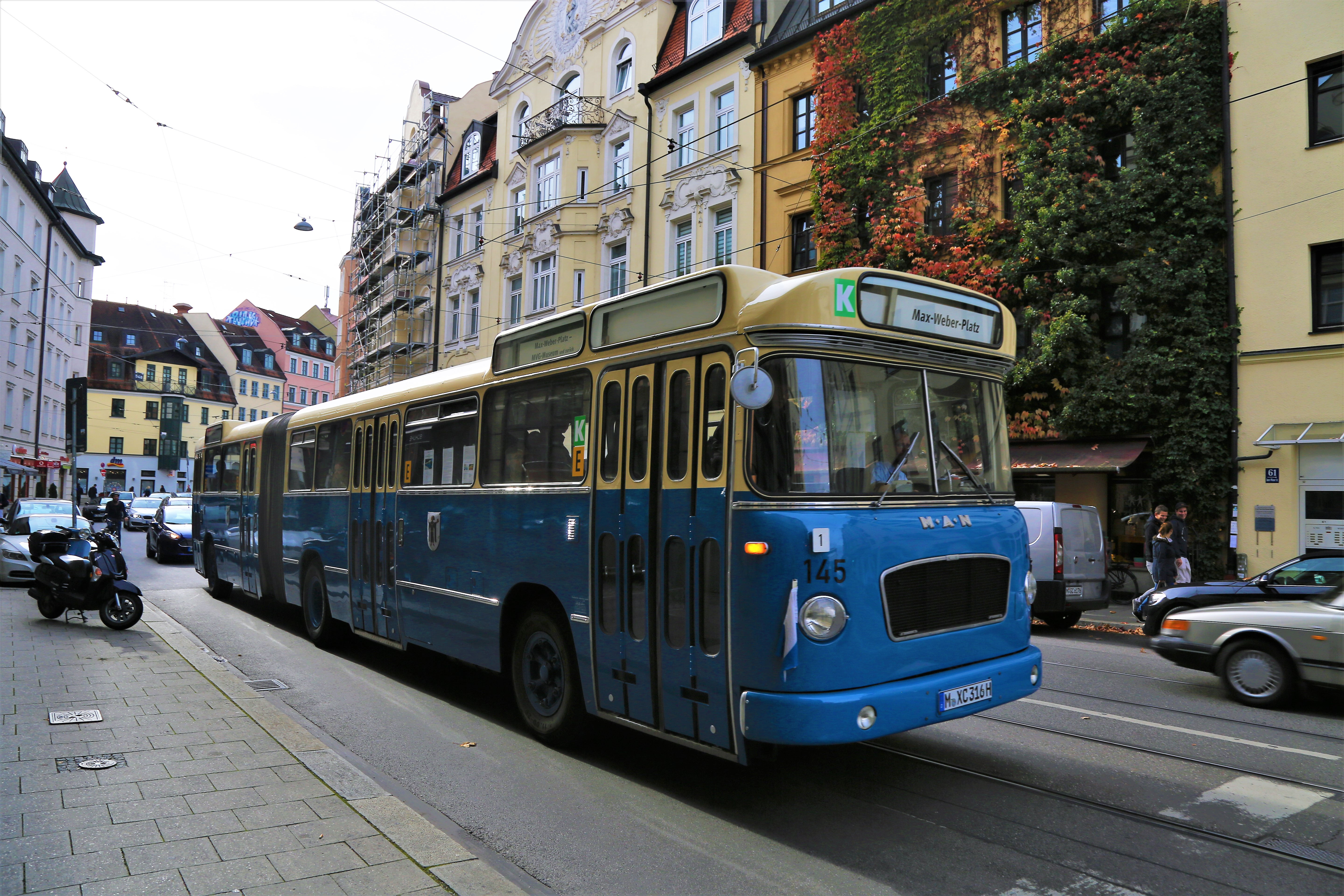 Oldtimer MAN/Göppel-Gelenkbus 145 zur Verbindung Max-Weber-Platz und das MVG-Museum zum 10-jährigen Bestehen des Museums. Aufnahme von der Inneren Wiener Straße aus.